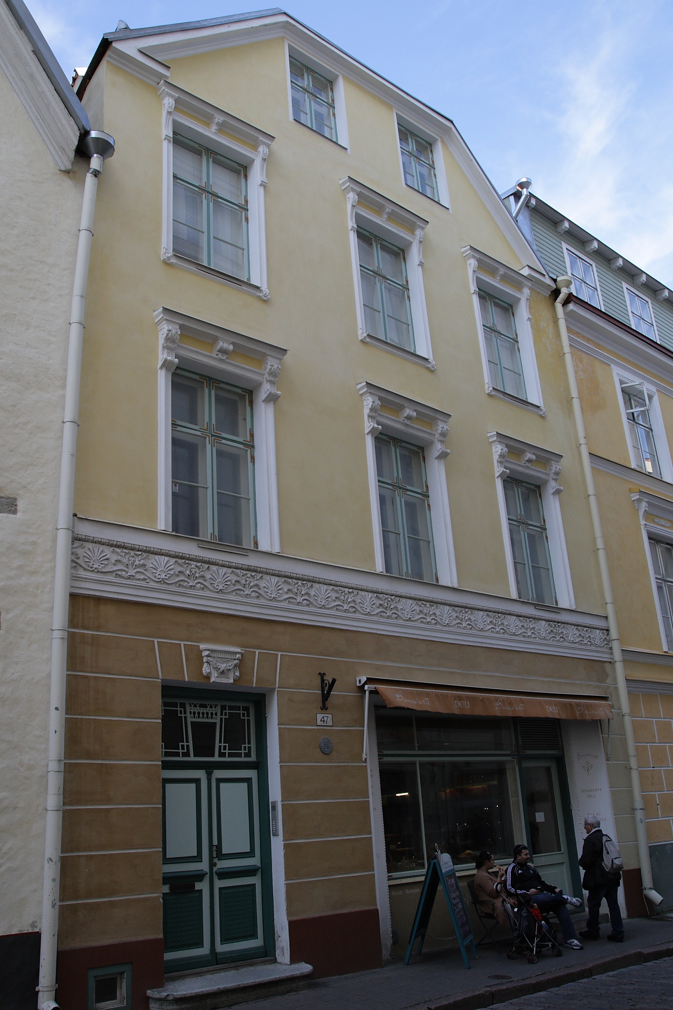 Tallinn, elamu Pikk 47 hooviansambliga, 15.-20.saj